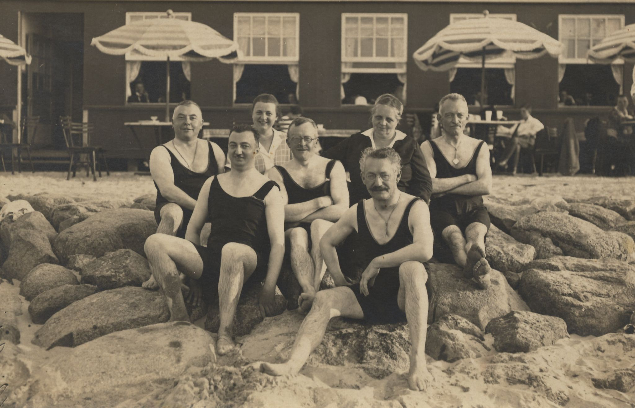 Vor dem Strandcafé